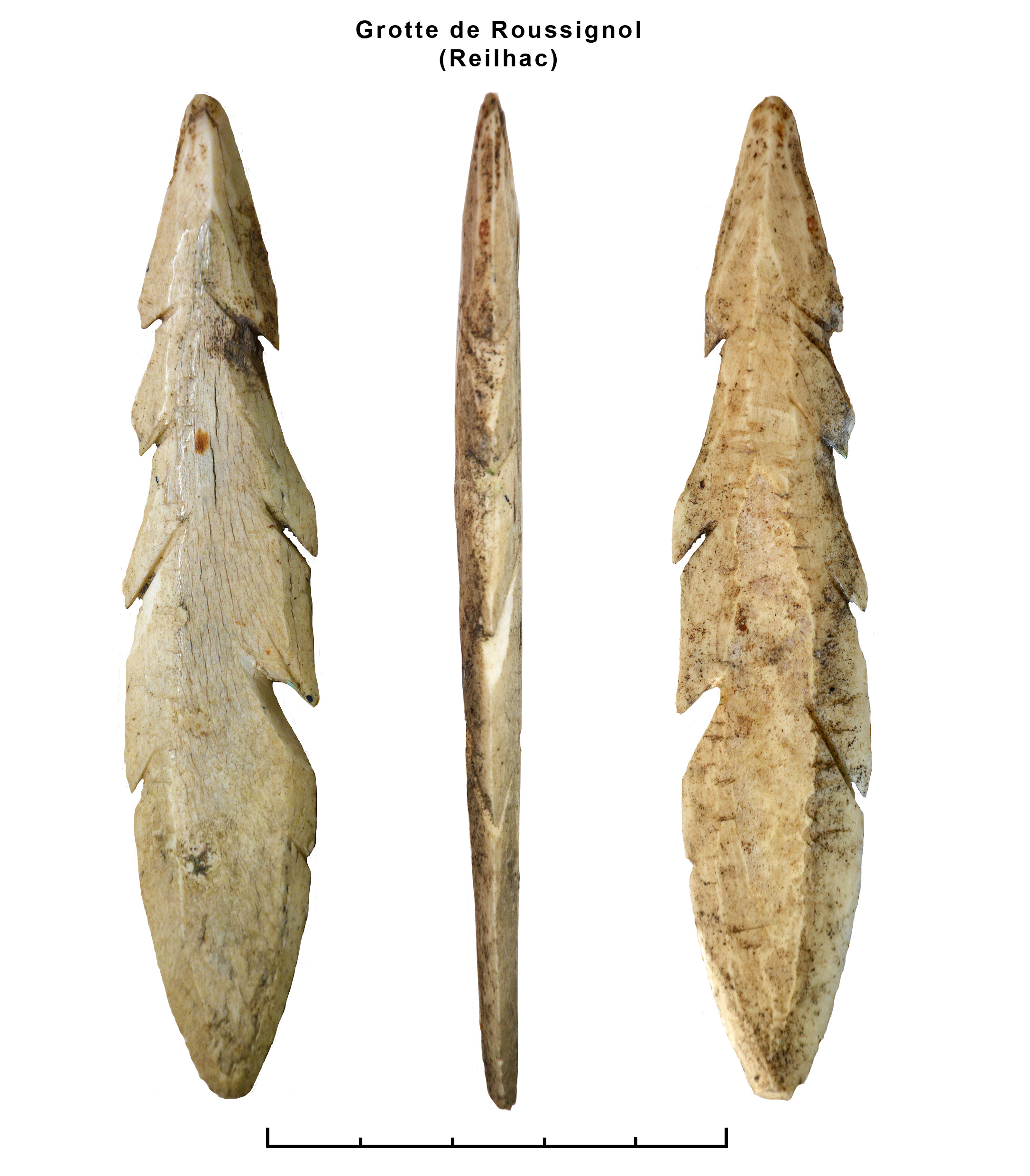 Harpon azilien réalisé dans un os long.Photographié par Pierre Billiant.